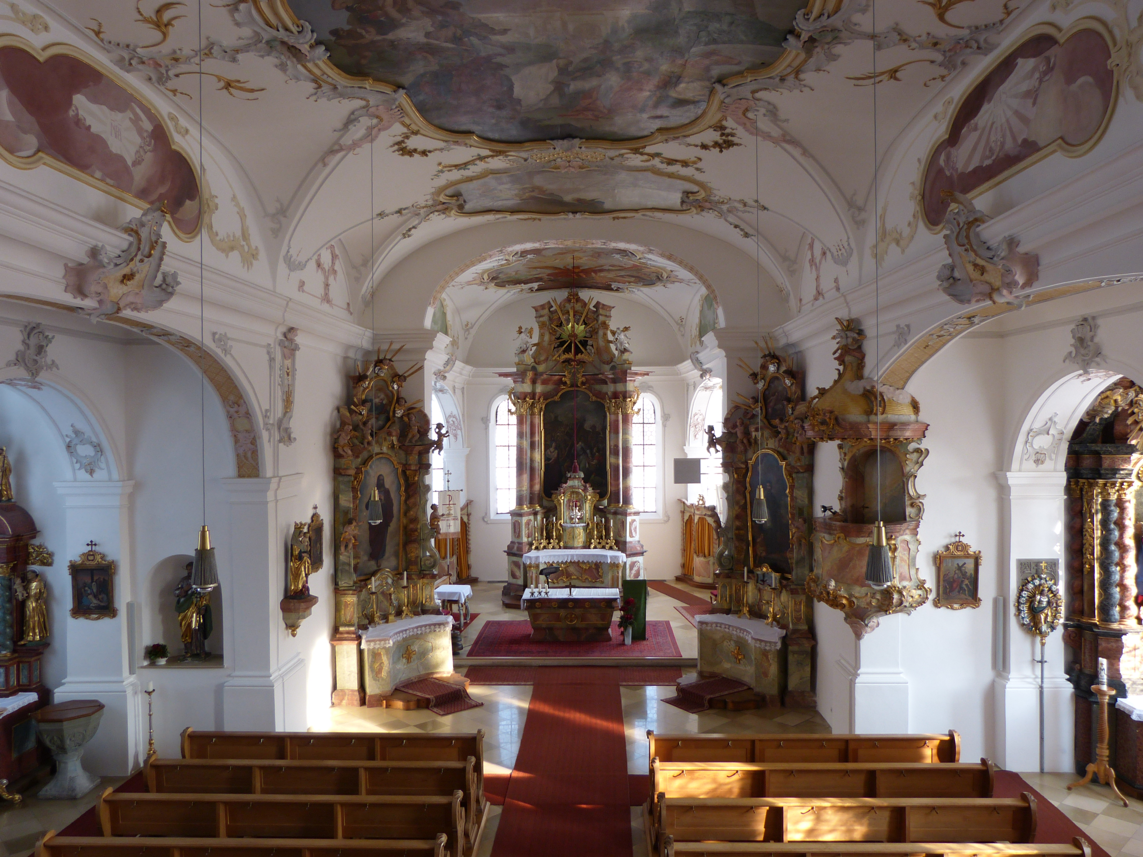 St. Peter und Paul, Lautrach, Landkreis Unterallgäu, Bayern